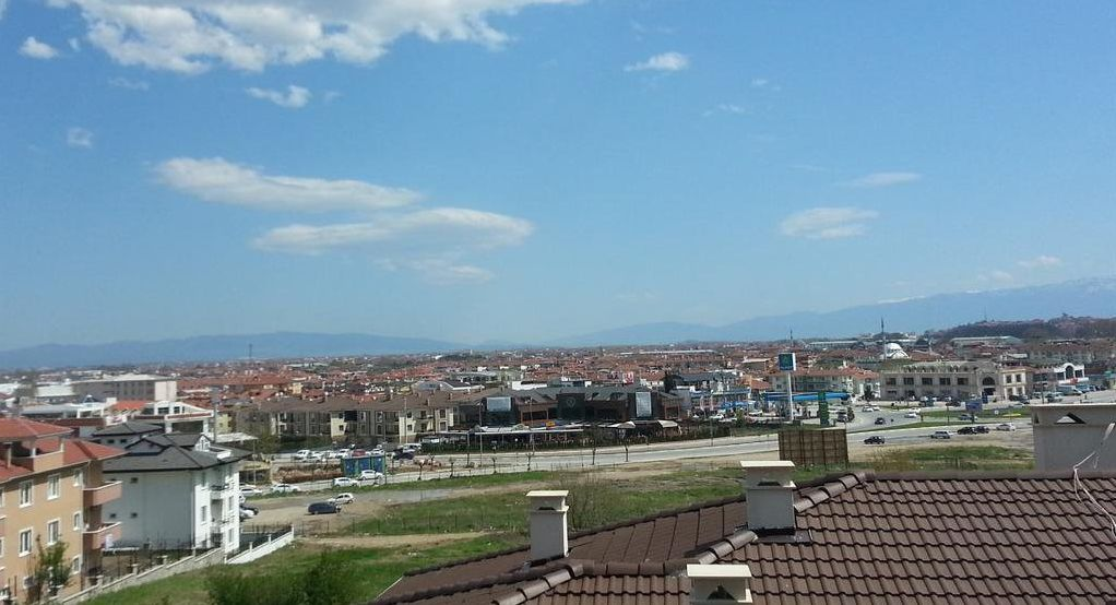 Adapazarı Ovası'nda tarımsal alanlar yerleşime açılmaya devam ediyor.